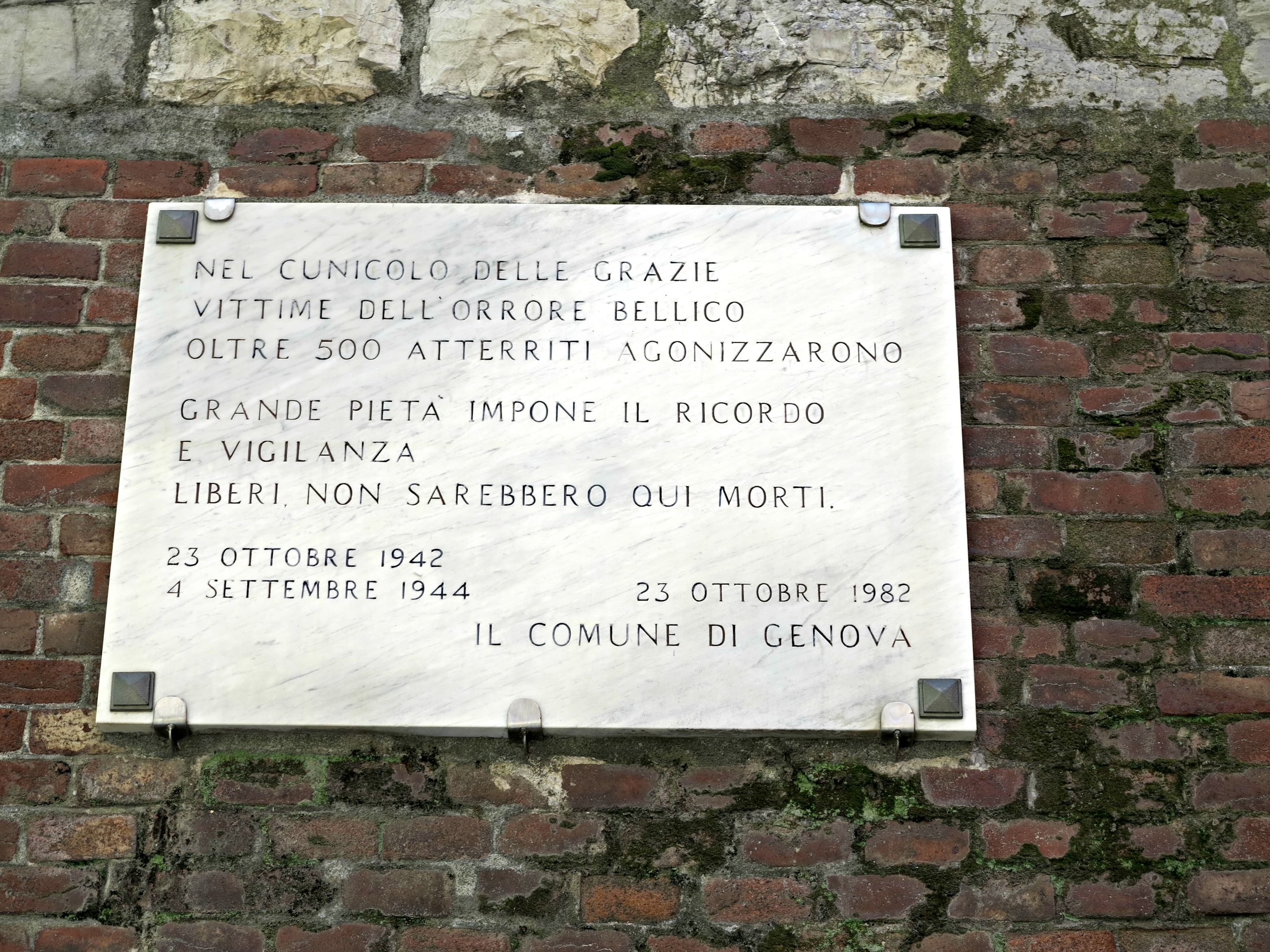 Porta Soprana This is a photo of a monument which is part of cultural heritage of Italy.